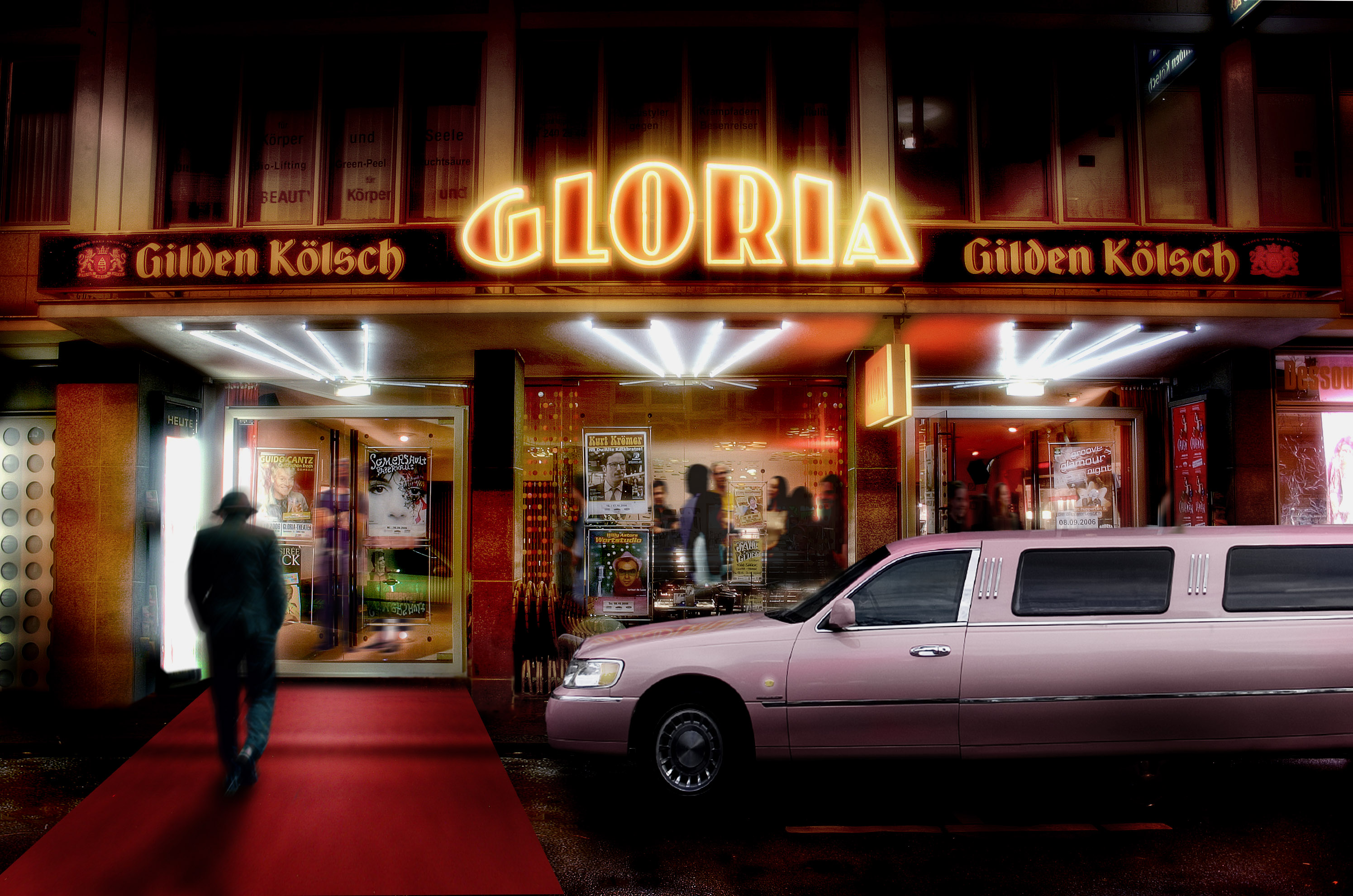 Das Gloria-Theater in Köln, Außenansicht